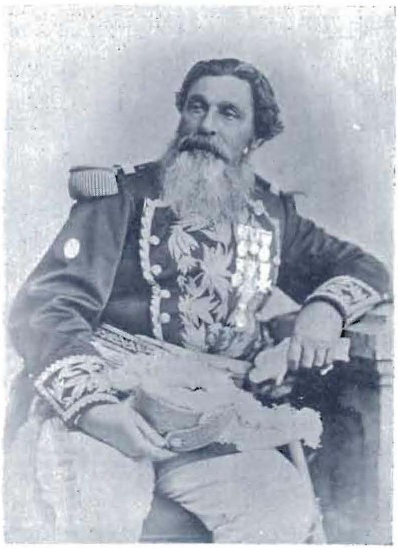 Coronel uruguayo Enrique Castro